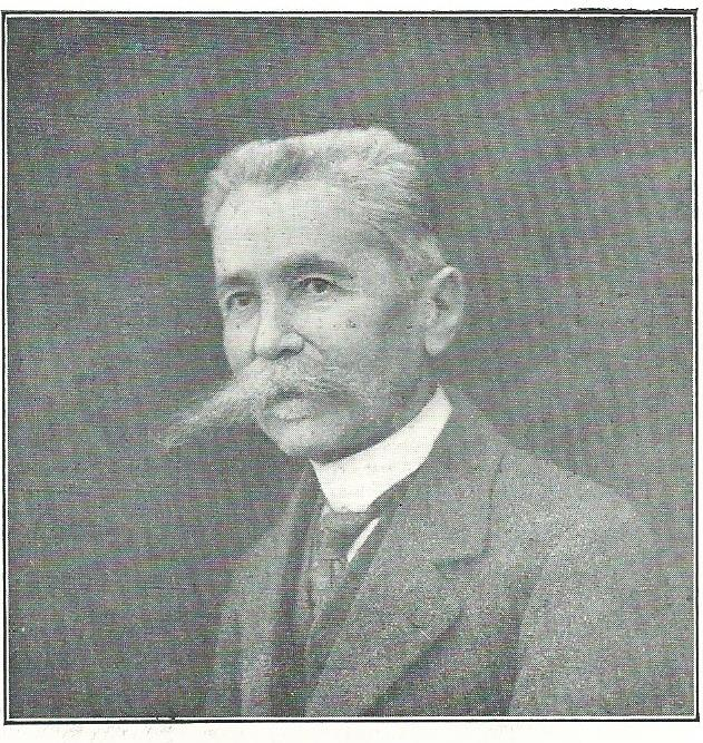 Ferdinand Guillebot de Nerville